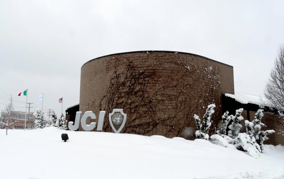 Sede de la JCI en Invierno